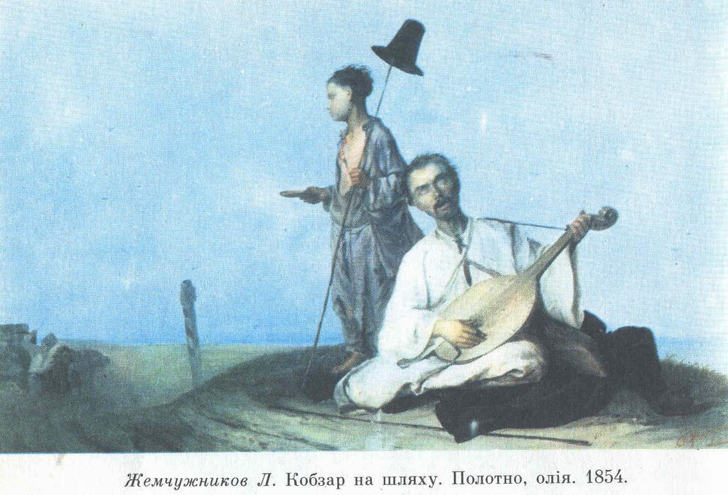 Л. Жемчужников, “Кобзар на шляху” (образотворче мистецтво)